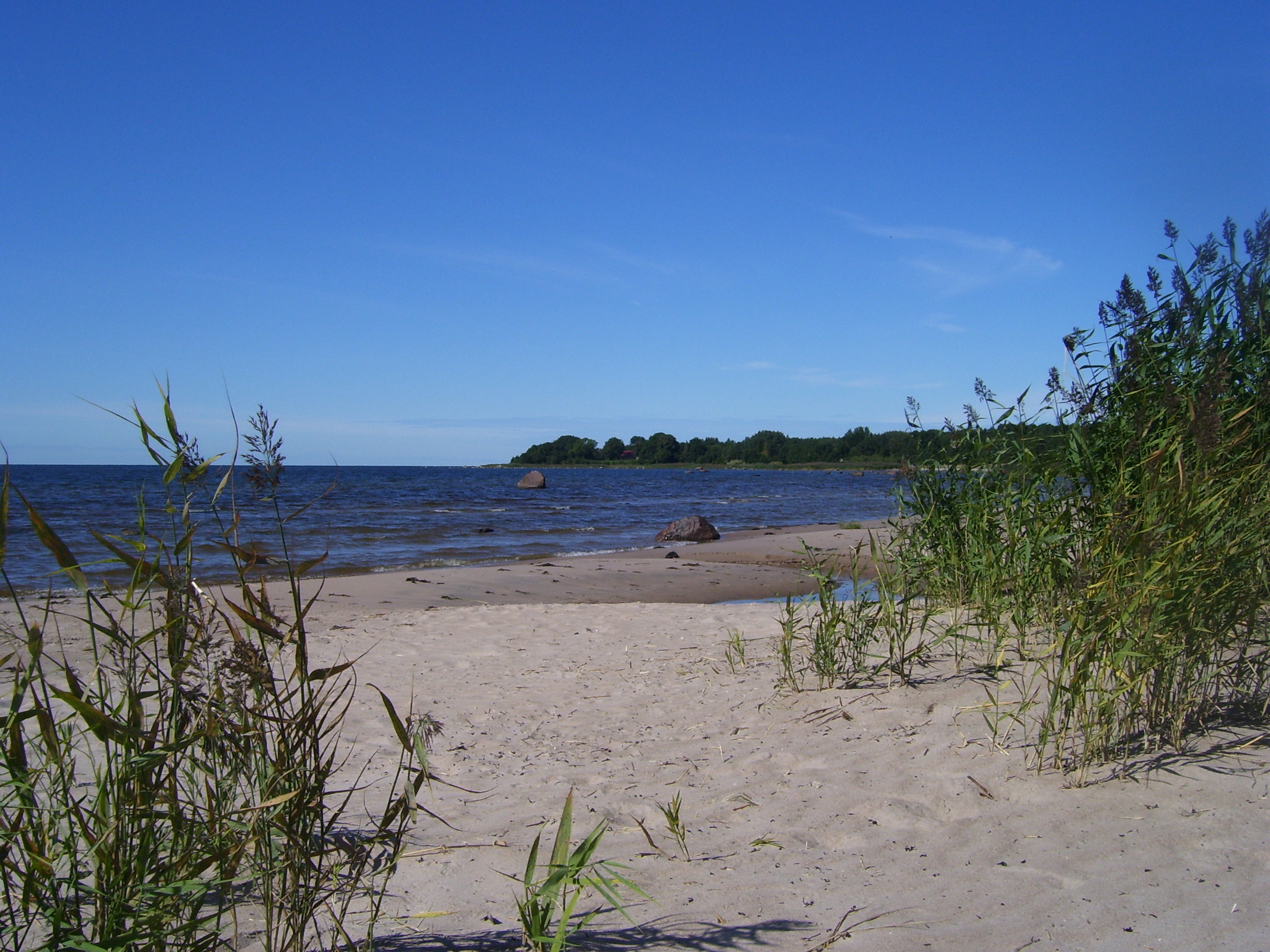 Aablaht, Kolga lahe siselaht, Juminda poolsaare läänerand, Kuusalu vald. Vaade Kolga-Aabla rannalt Kiiu-Aabla poole.